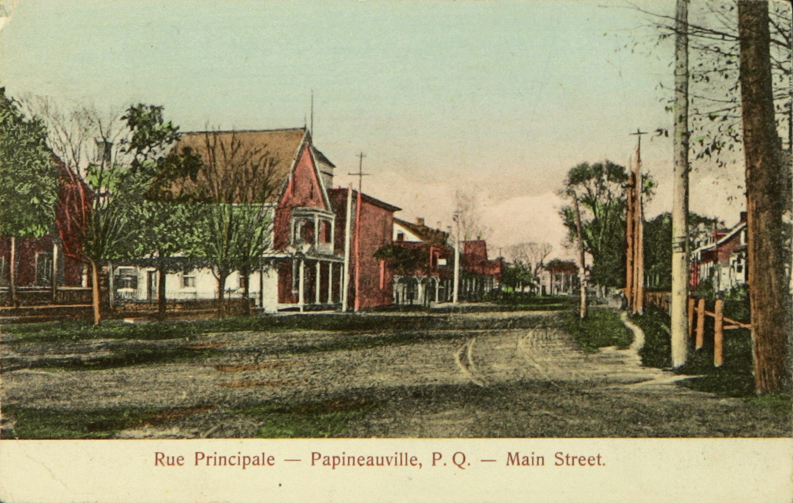 Rue Principale, Papineauville, P. Q., carte postale, L.E. Chevrier, éditeur